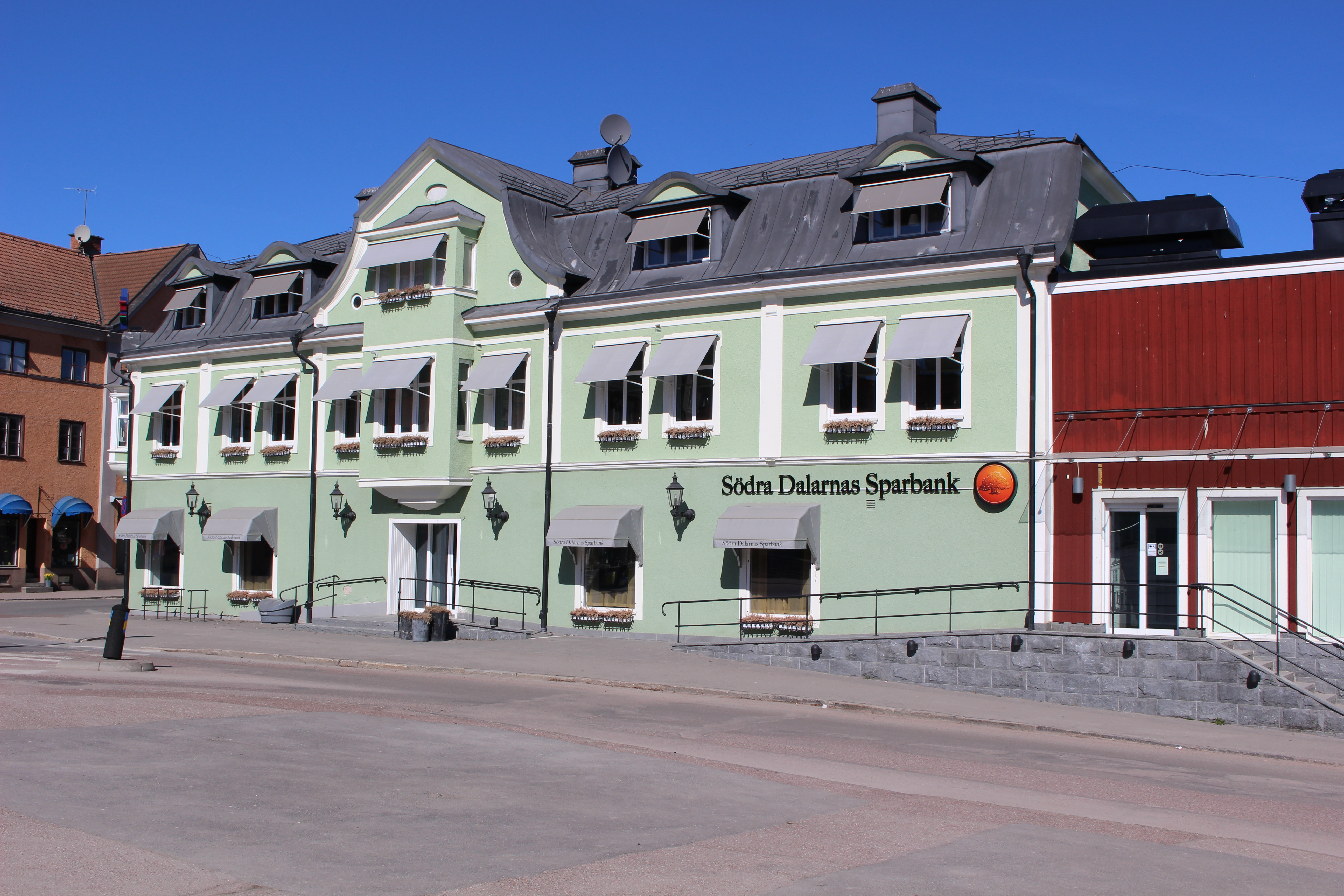 Södra Dalarnas Sparbank i gamla järnhandeln i Hedemora.